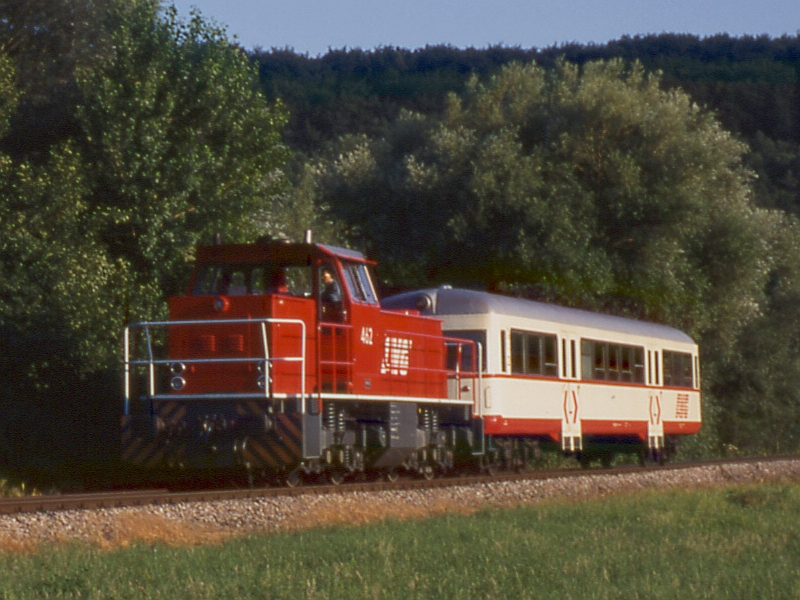 AVG Lok 462 mit Personenzug bei Menzingen